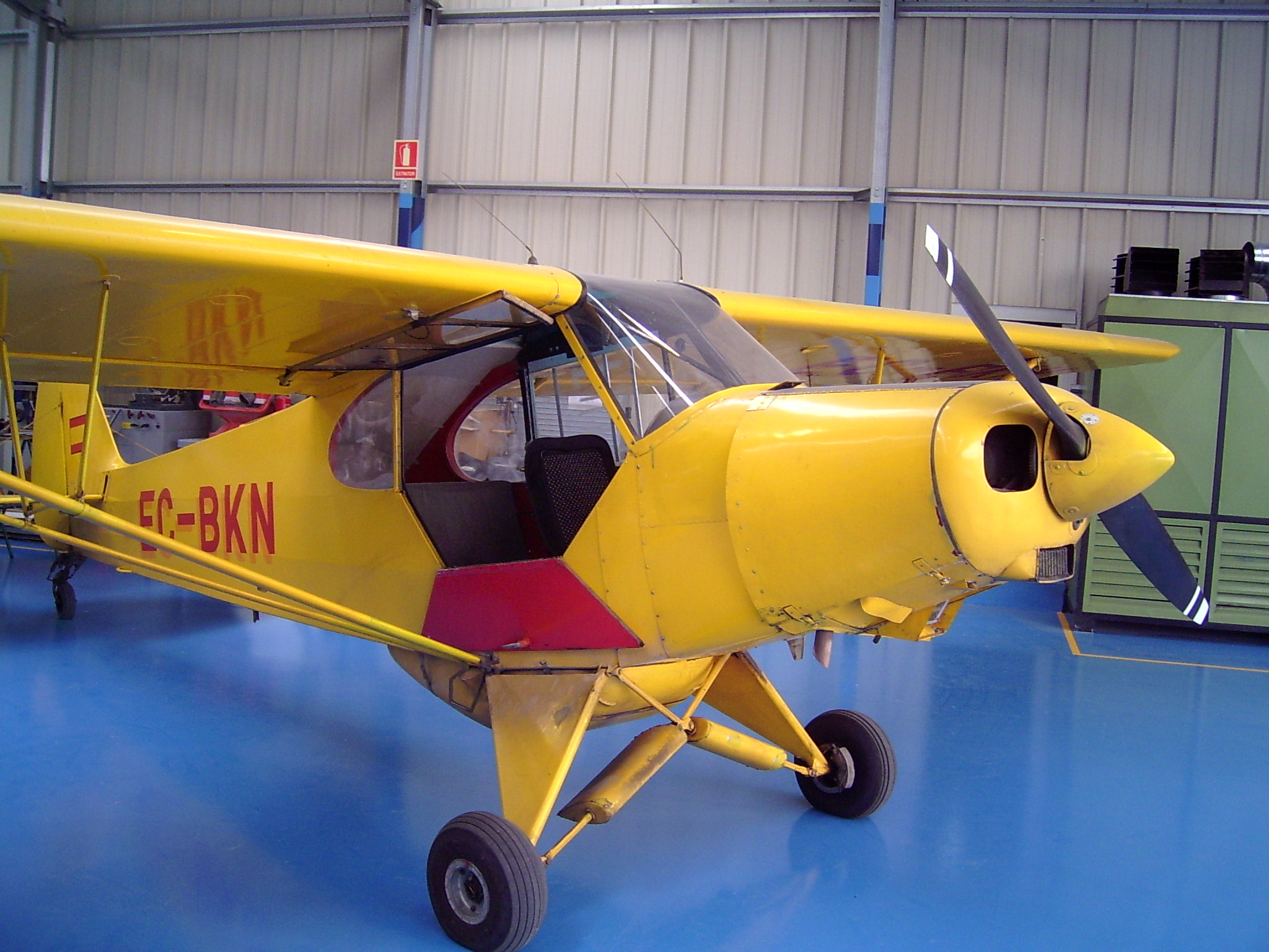 Piper PA-18 (EC-BKN) a l'Aeroport de Sabadell (Catalunya)